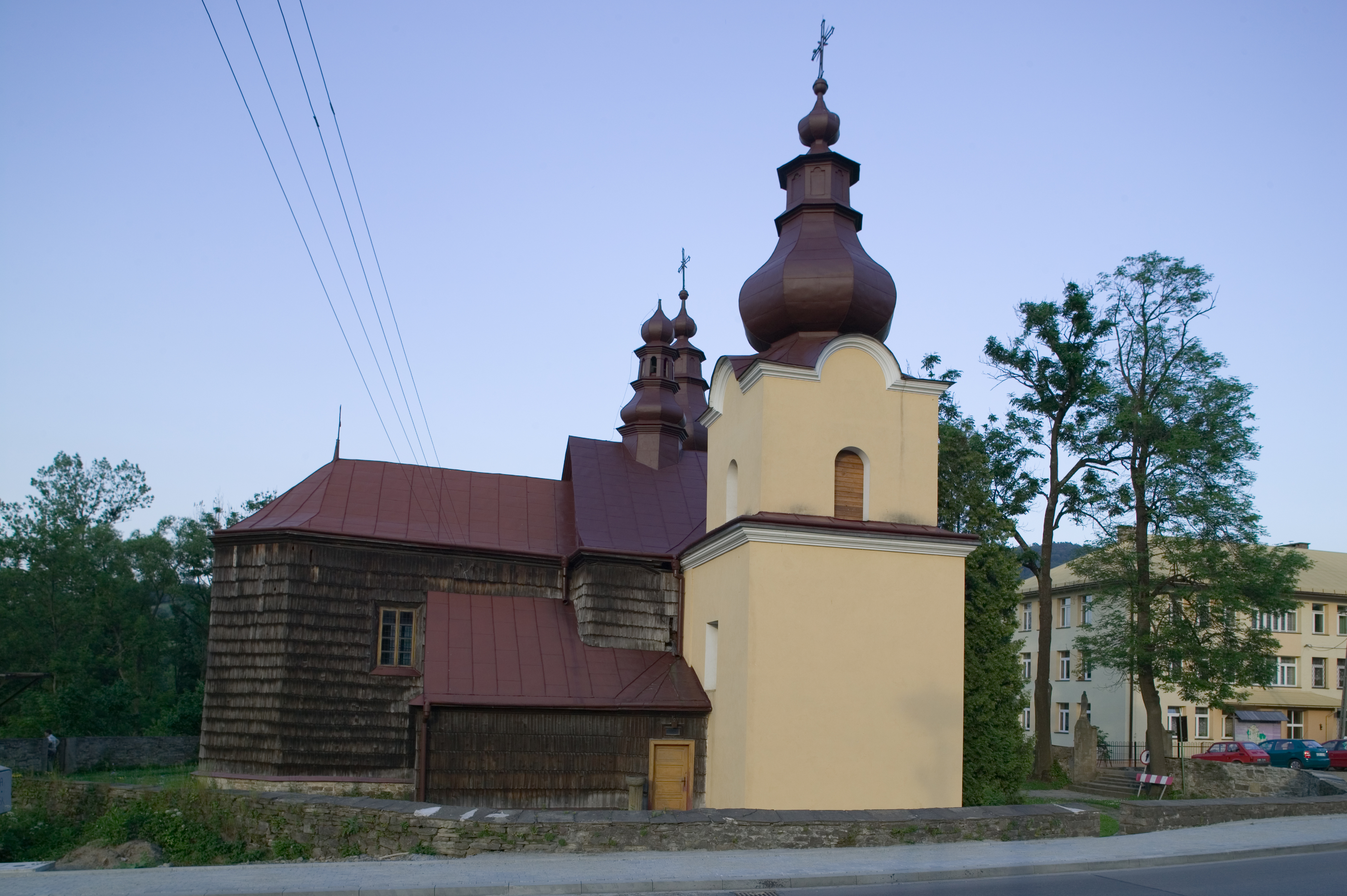 Ropa, barokowy kościół drewniany pw. św. Michała Archanioła z 1761 roku